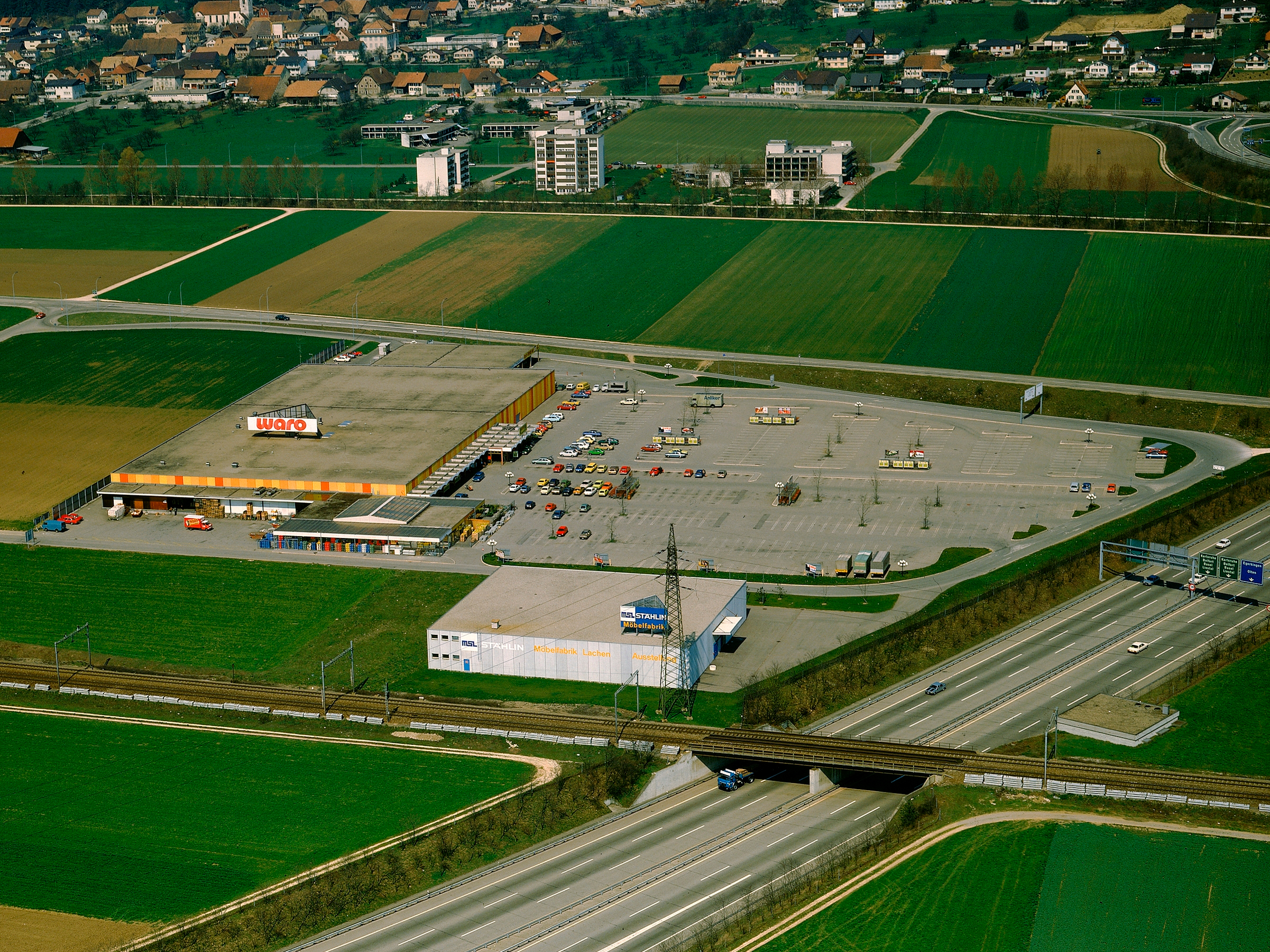 Flugaufnahme des Supermarkts Waro bei Egerkingen (Zuschnitt)